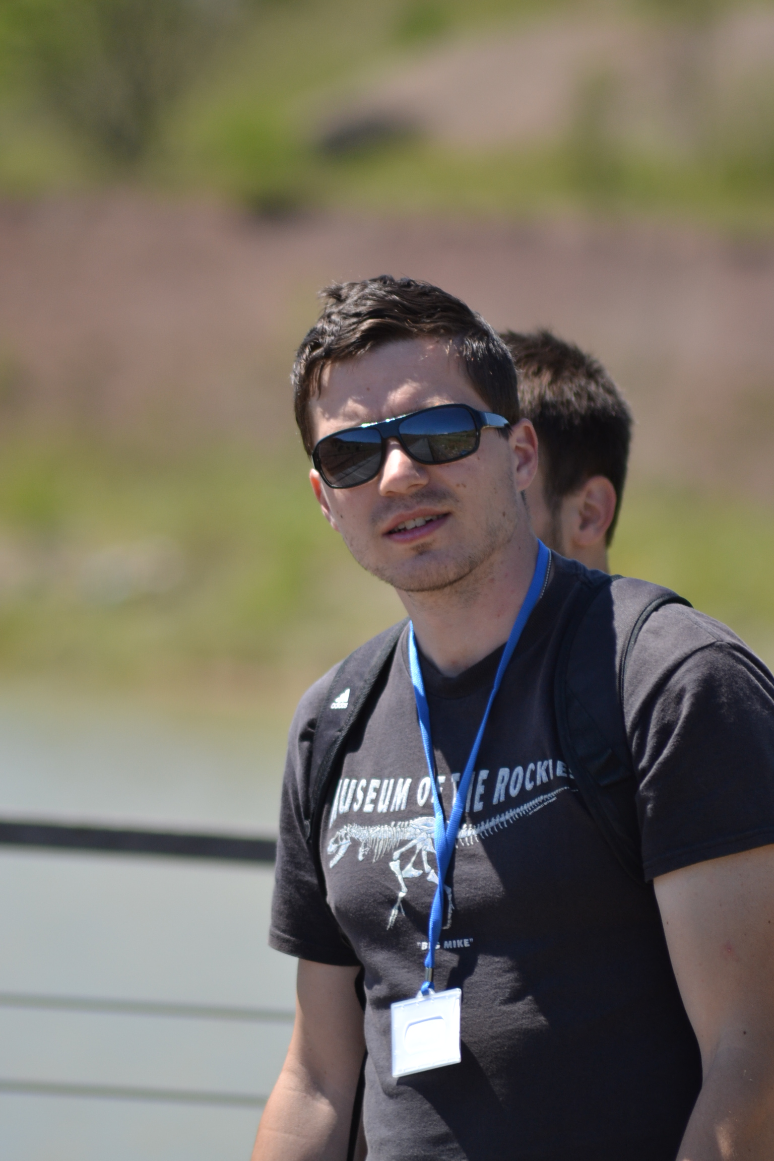 Vladimír Socha v průběhu mítinku EAVP v polské Opoli, červenec 2015.